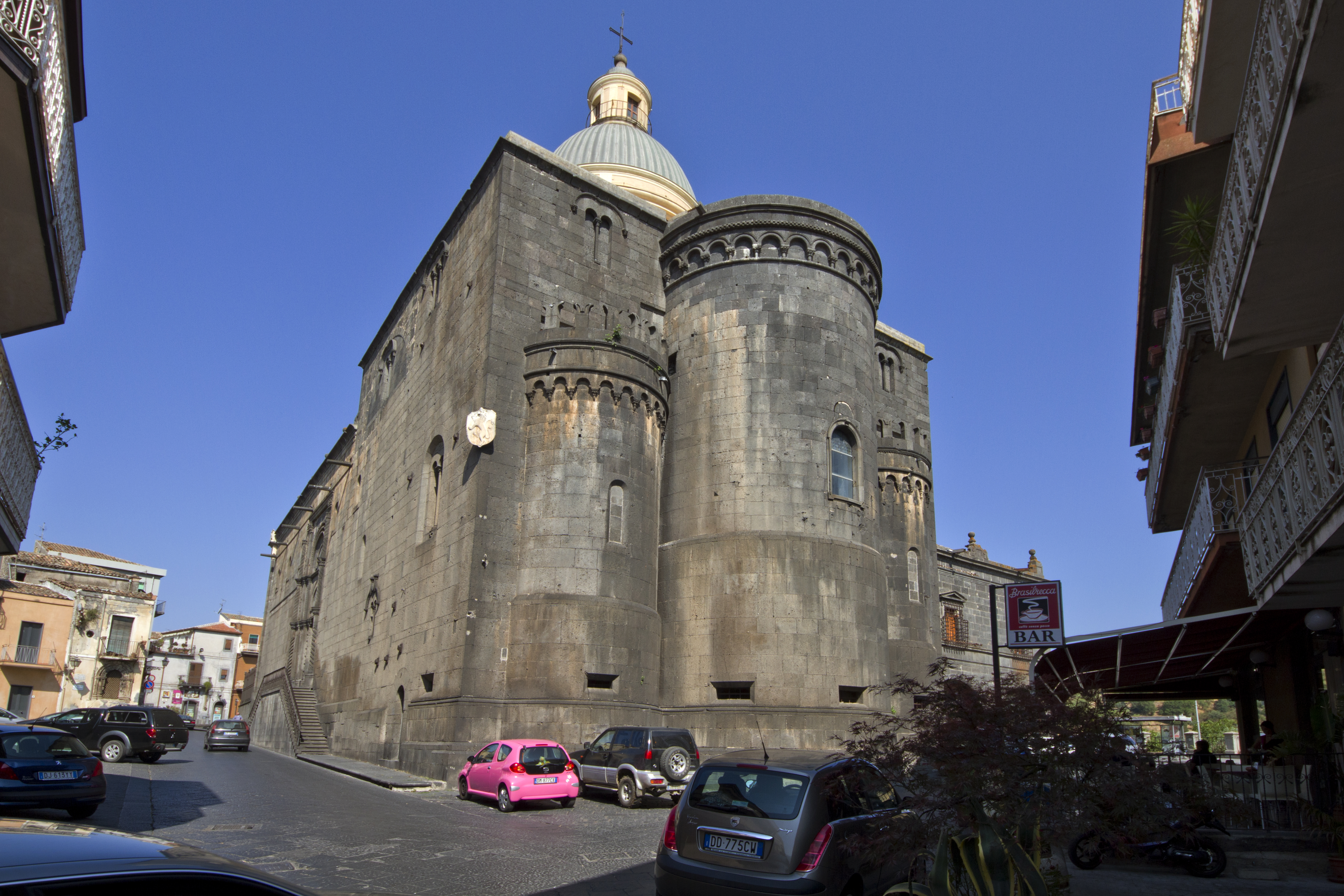 Basilica di Santa Maria, Randazzo Catania, Sicily, Italy